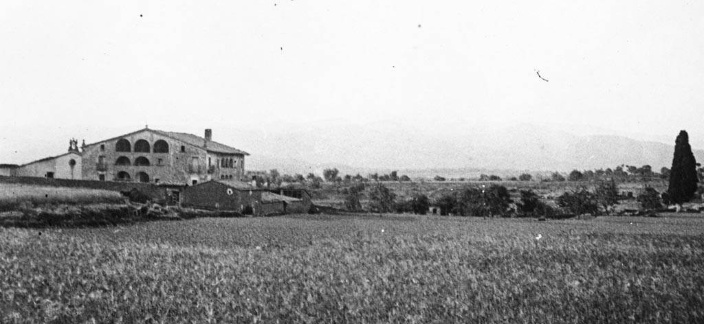 Vista general de la Sala de Linya. Cèsar August Torras i Ferreri (Entre 1890 i 1923)